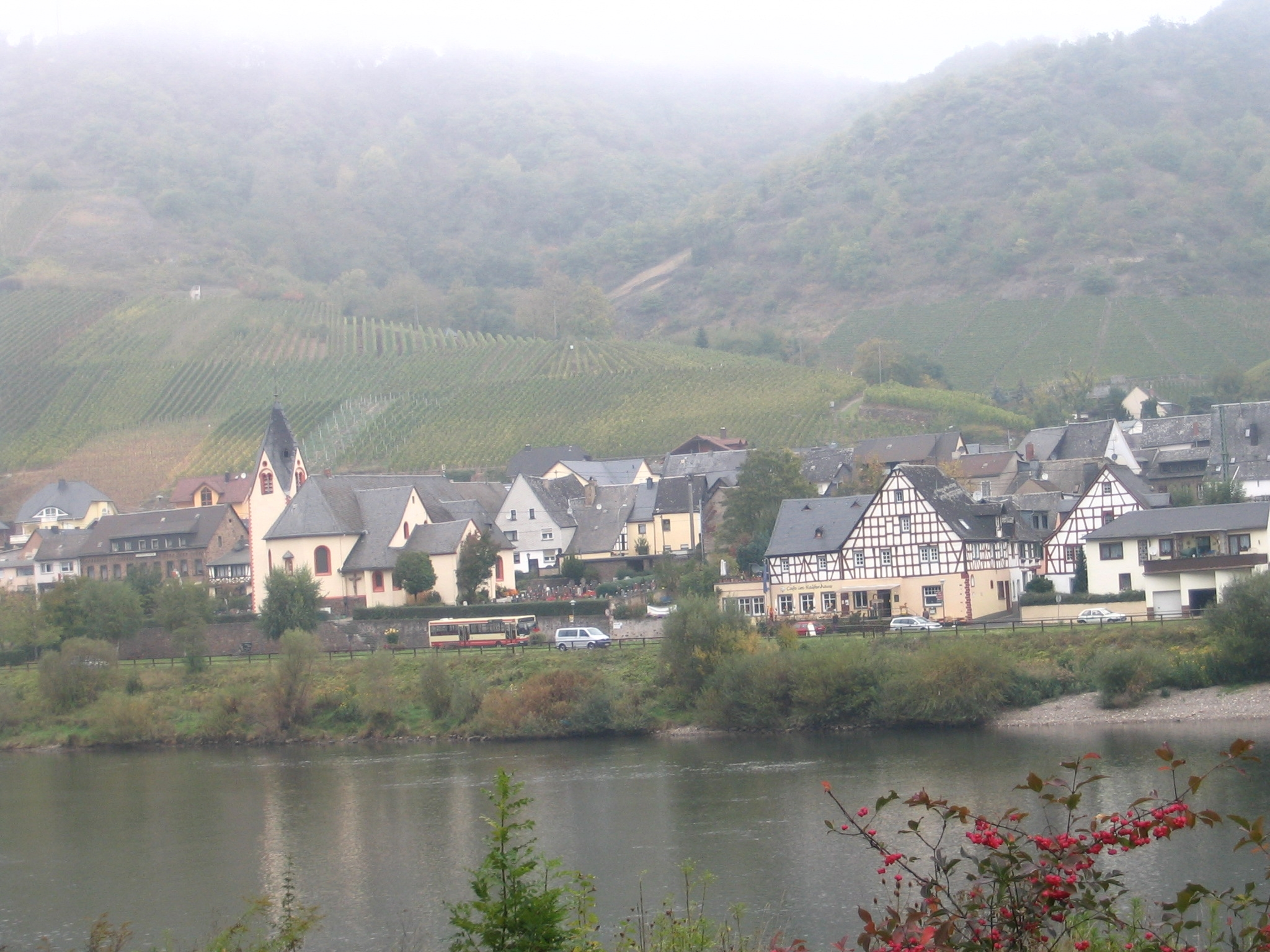 Müden and Moselle River